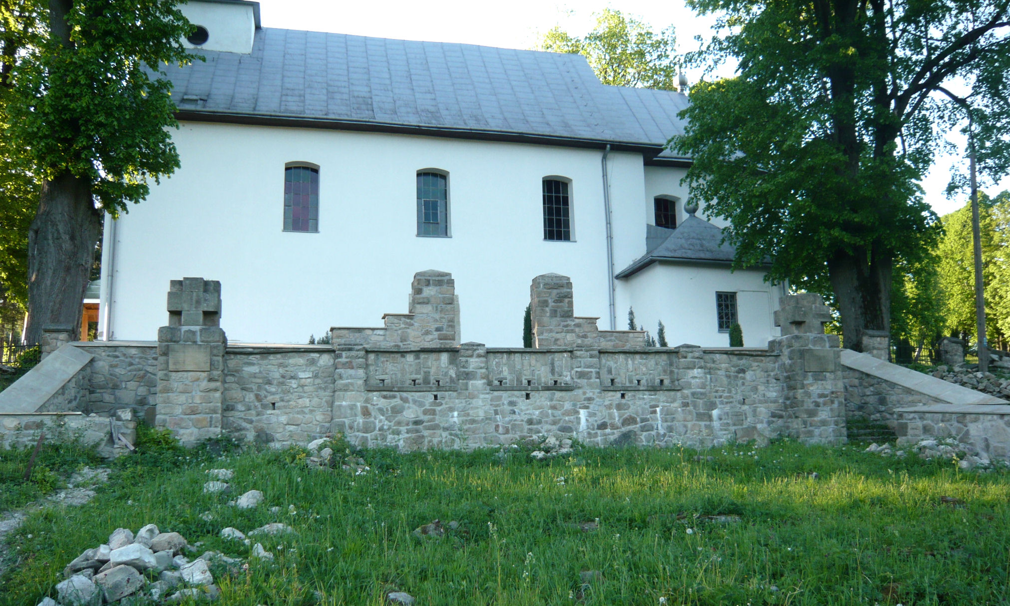 Cmentarz wojenny nr 7 - Desznica